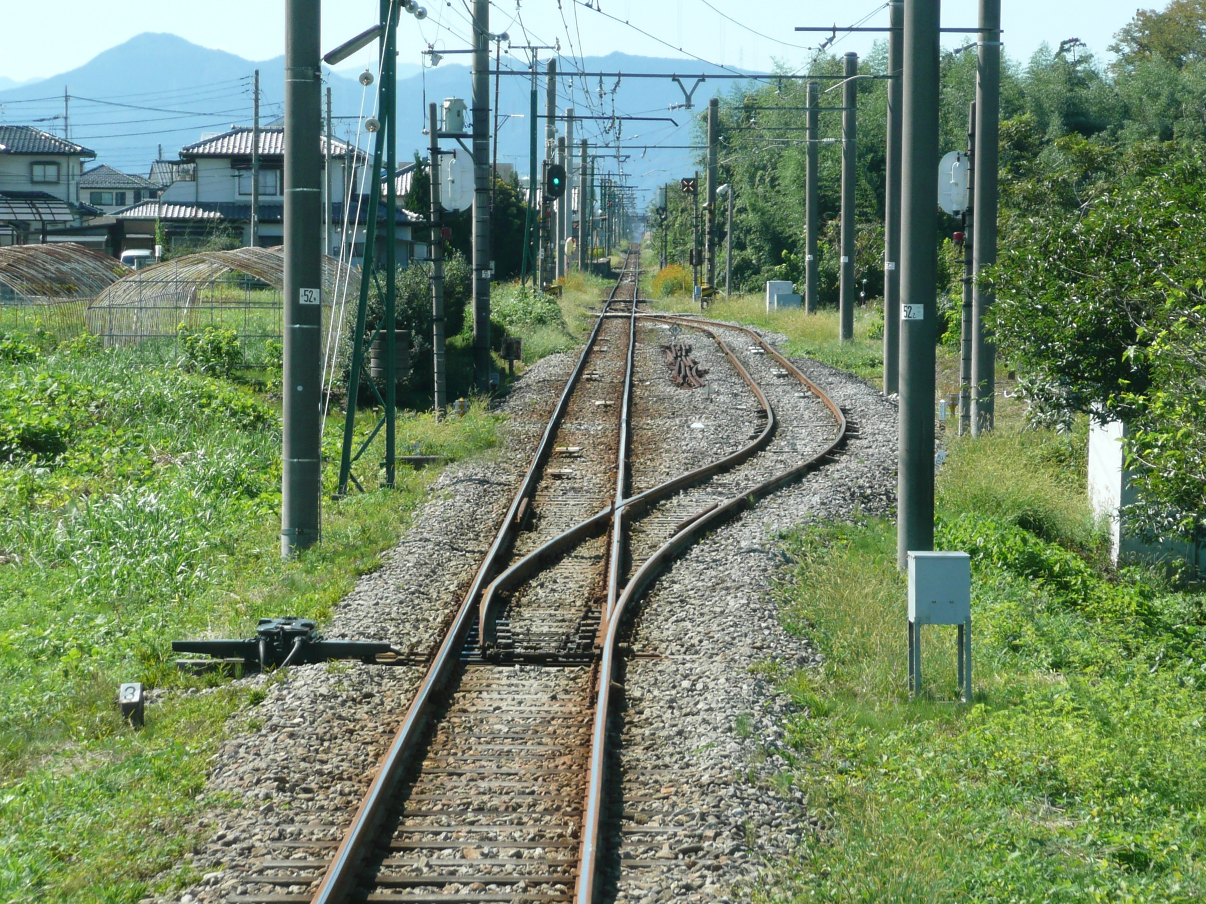 上信電鉄上信線新屋信号所（高崎方から撮影）